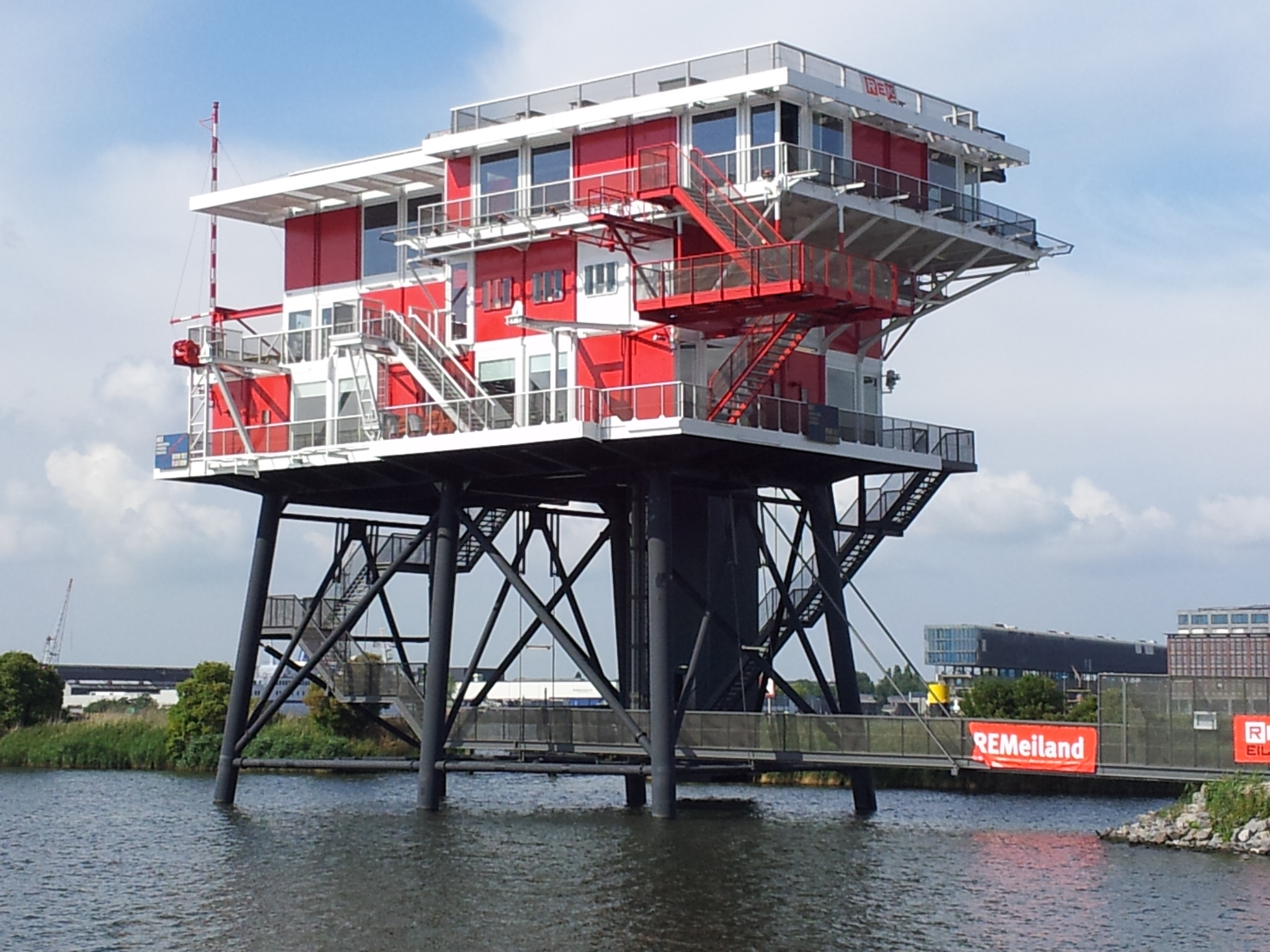 Het REM-eiland, afgemeerd aan de Haparandadam in de Amsterdamse Houthavens. Juli 2011.